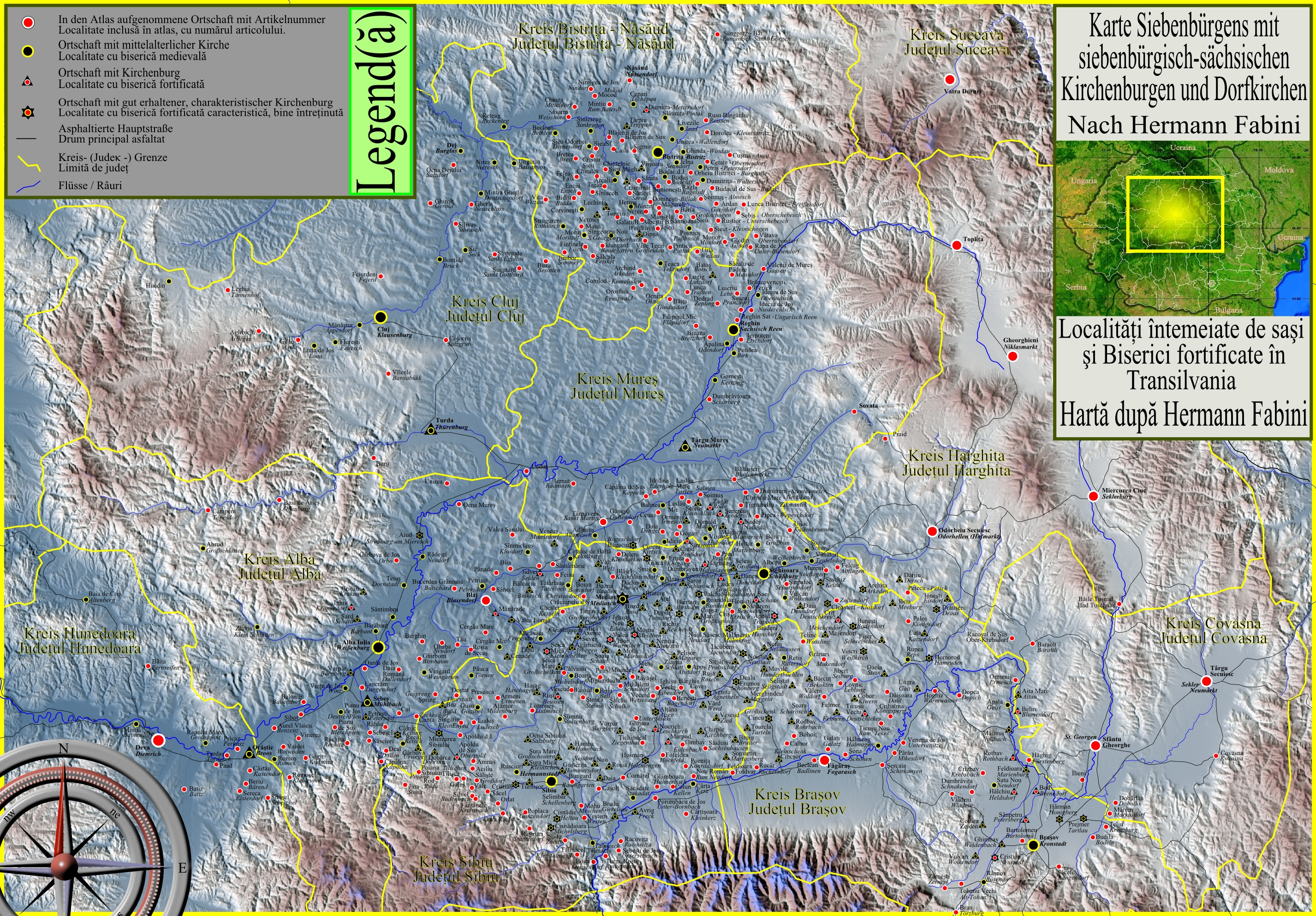 Localitati cu biserici sasesti din Transilvania.